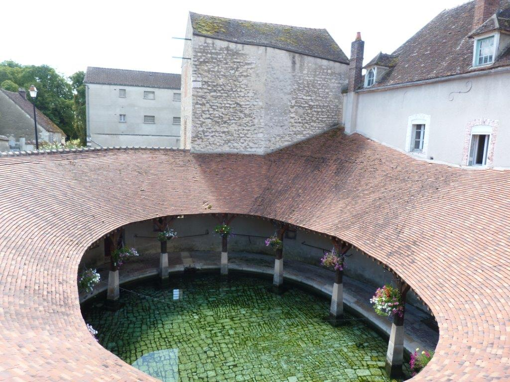 Lavejo